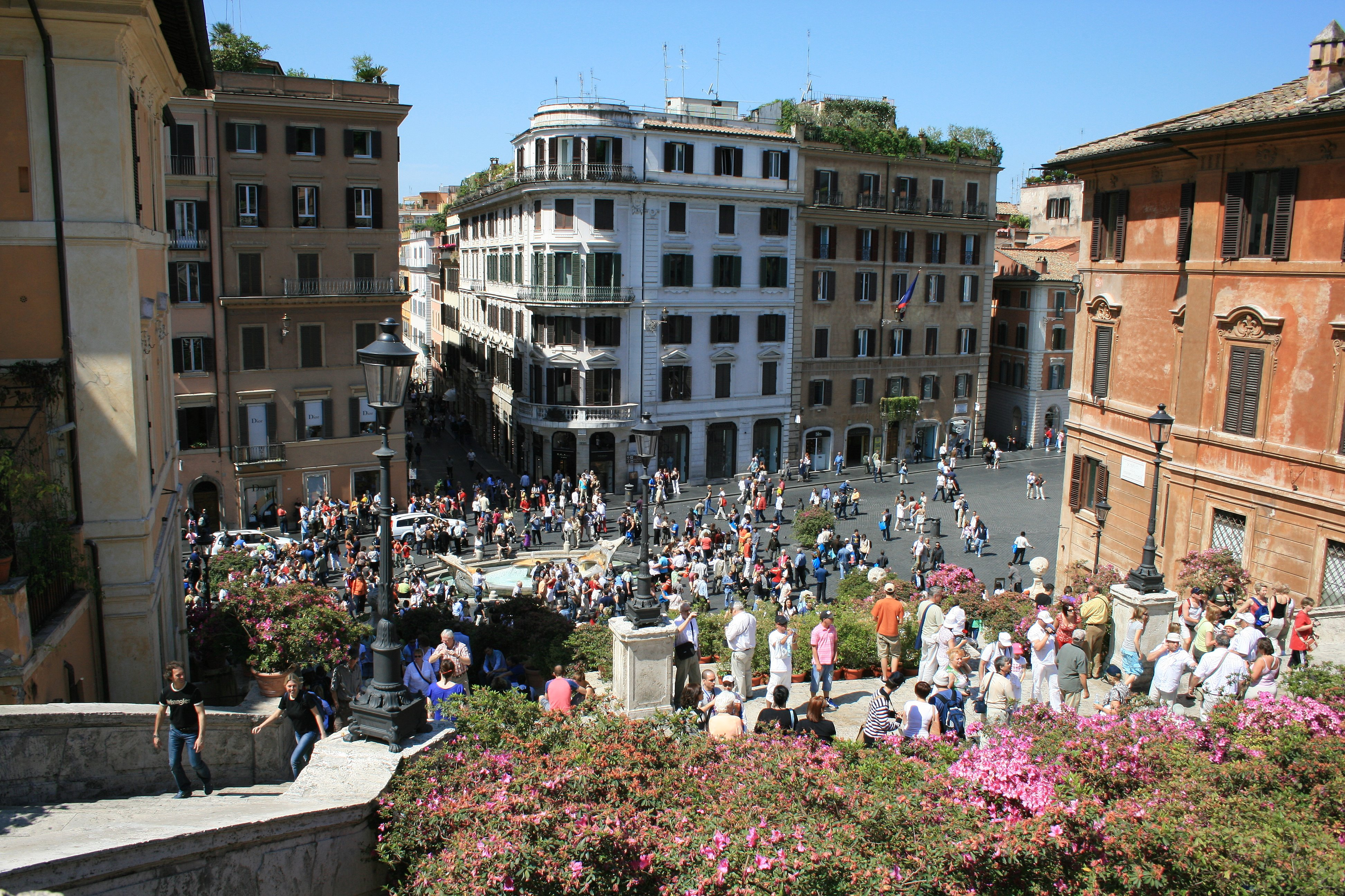 Piazza di Spagna in Rome